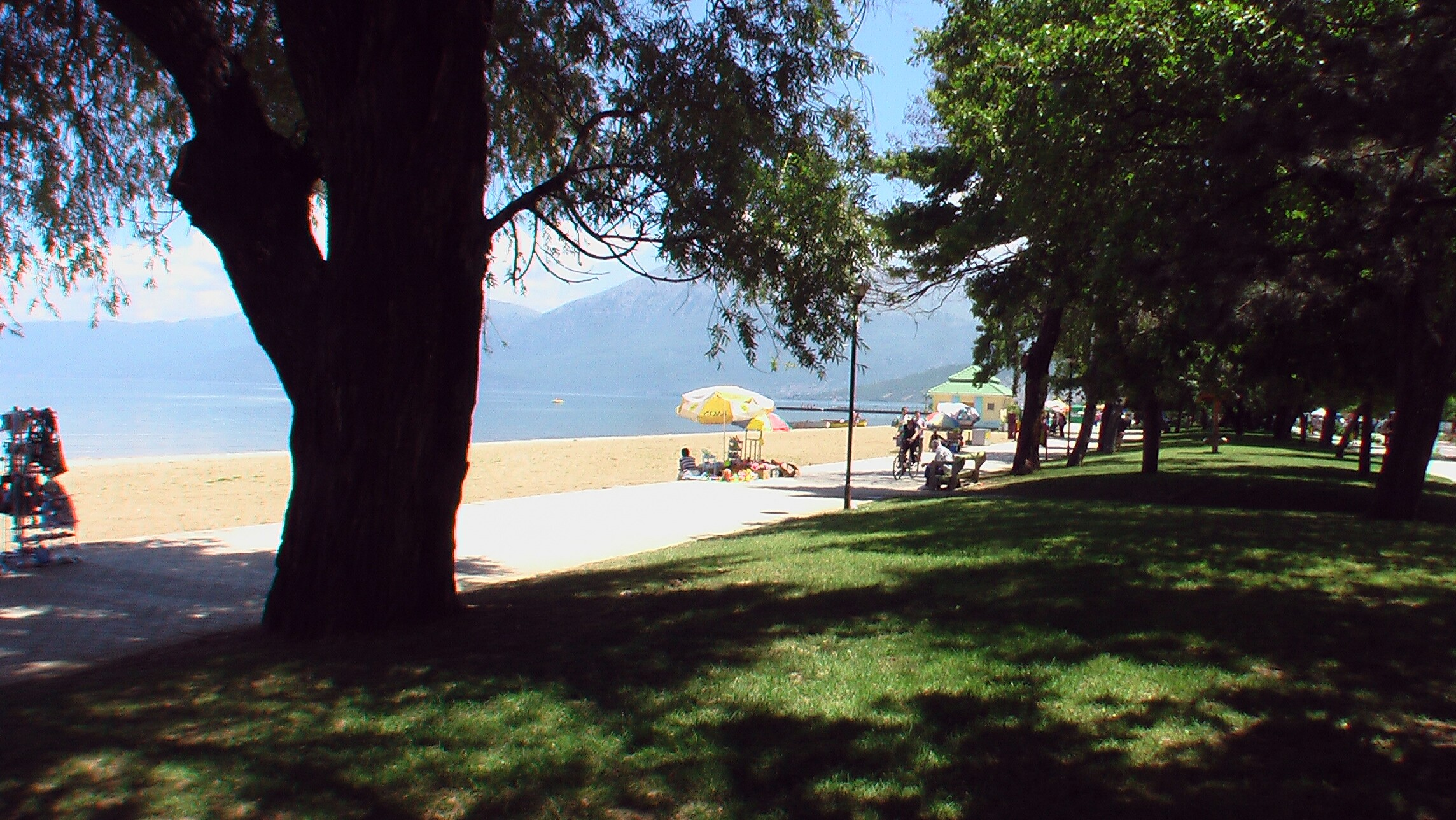 PogradecSeePromenade